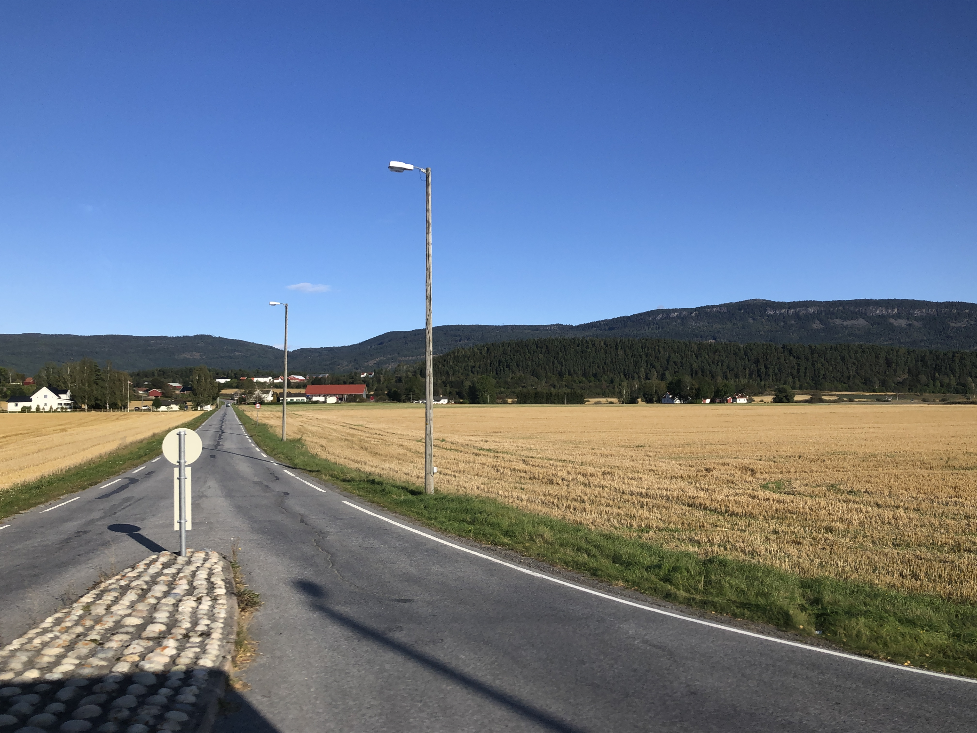 Vollgata på Steinssletta i Hole i Buskerud.